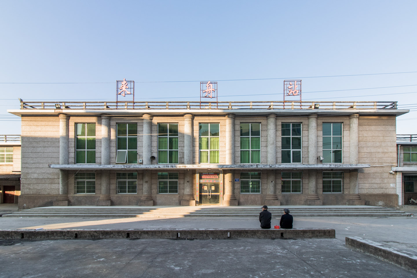 中文（中国大陆）: 鹰厦铁路来舟站